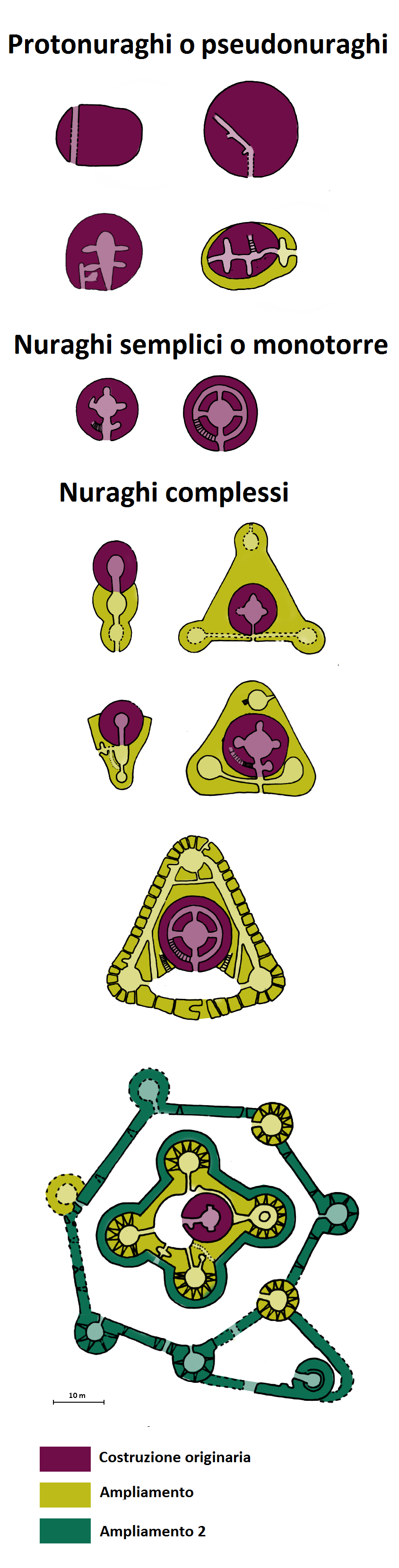 Evoluzione dei nuraghi